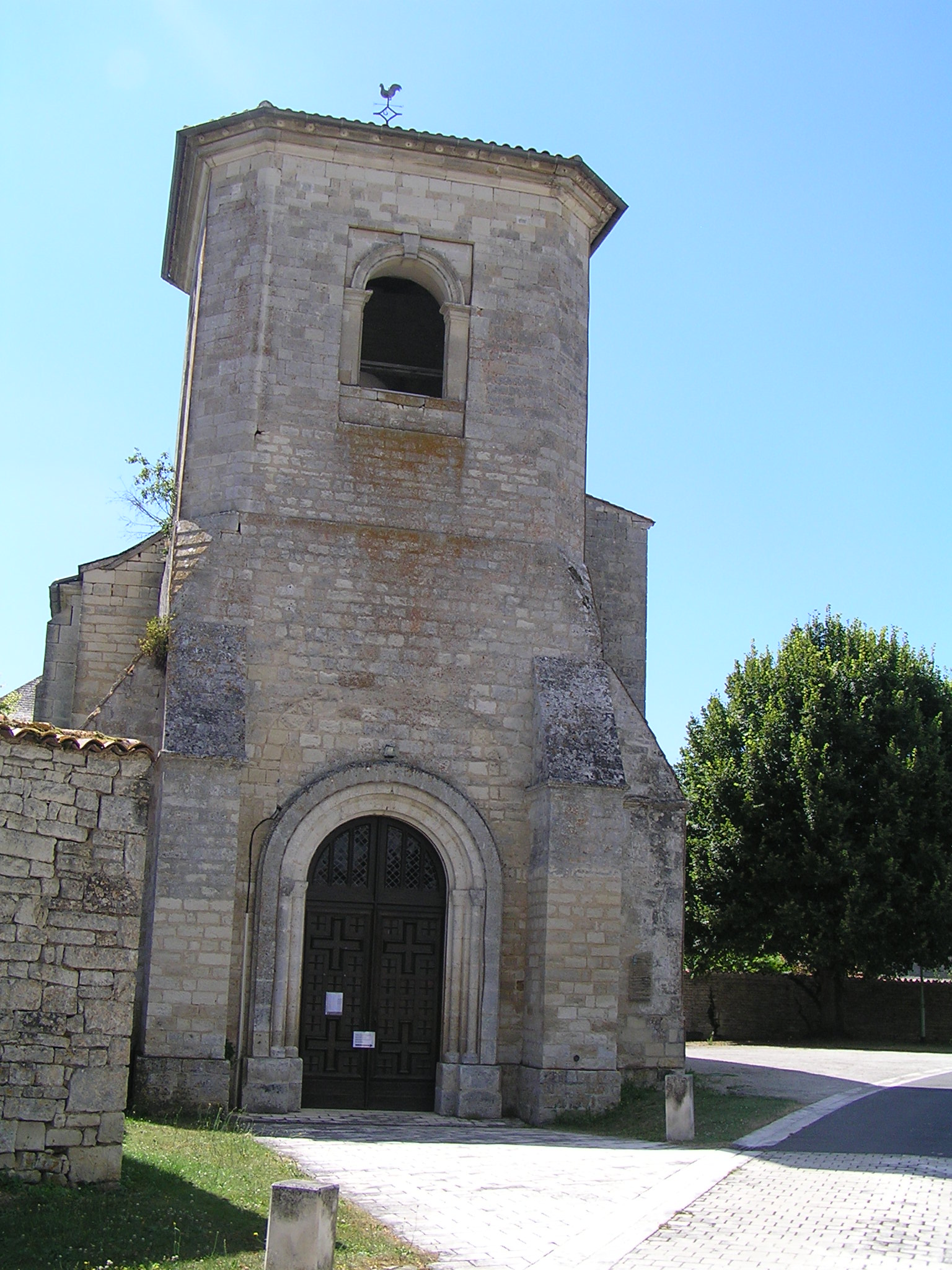 église de Saint-Fraigne, Charente, France